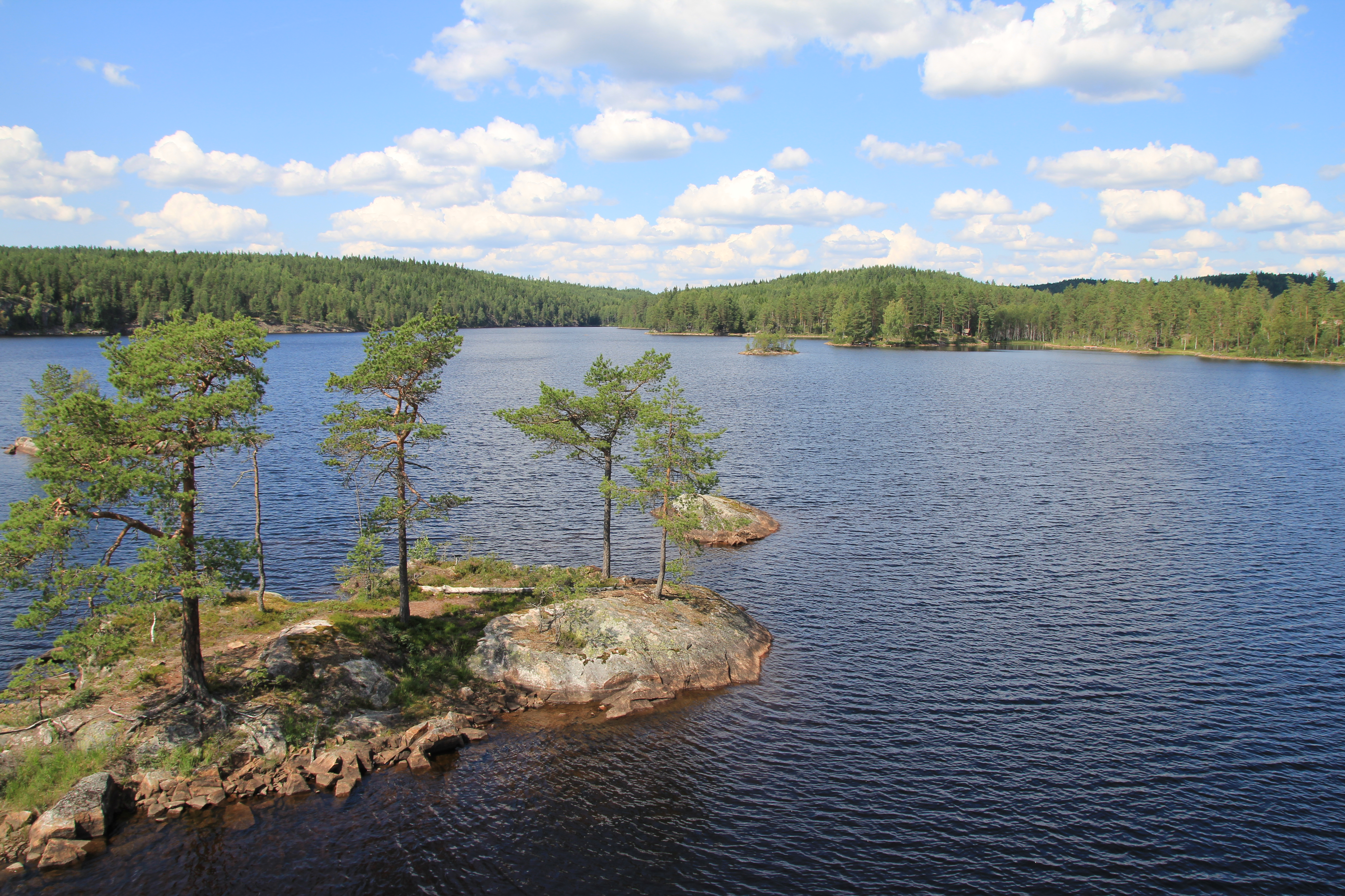 Vortungen er en innsjø 214 meter over havet i tidligere Rømskog kommune, Østfold, fra 2020 i Aurskog-Høland kommune, Viken.